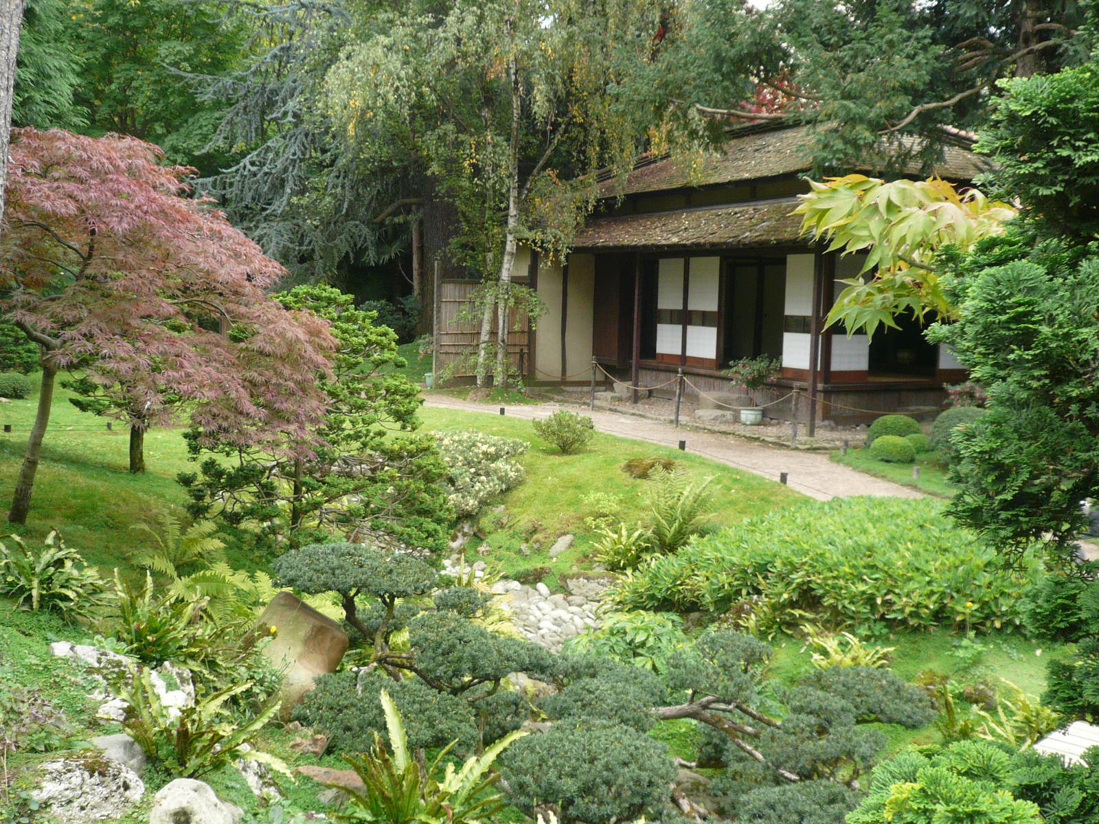 Boulogne-Billancourt (Hauts-de-Seine, France) : Village japonais du Musée départemental Albert-Kahn.